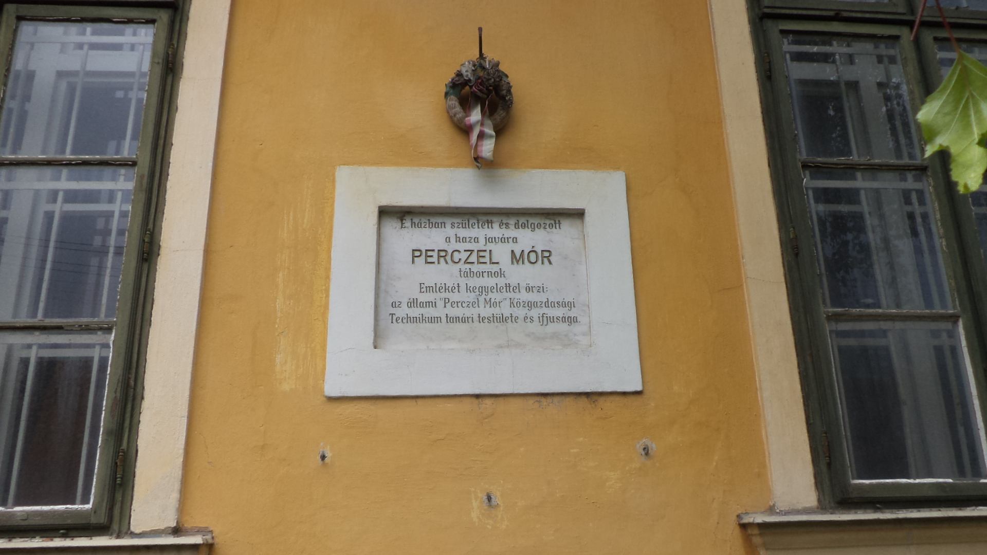 Perczel Mór emléktáblája a szülőházán, Bonyhádon